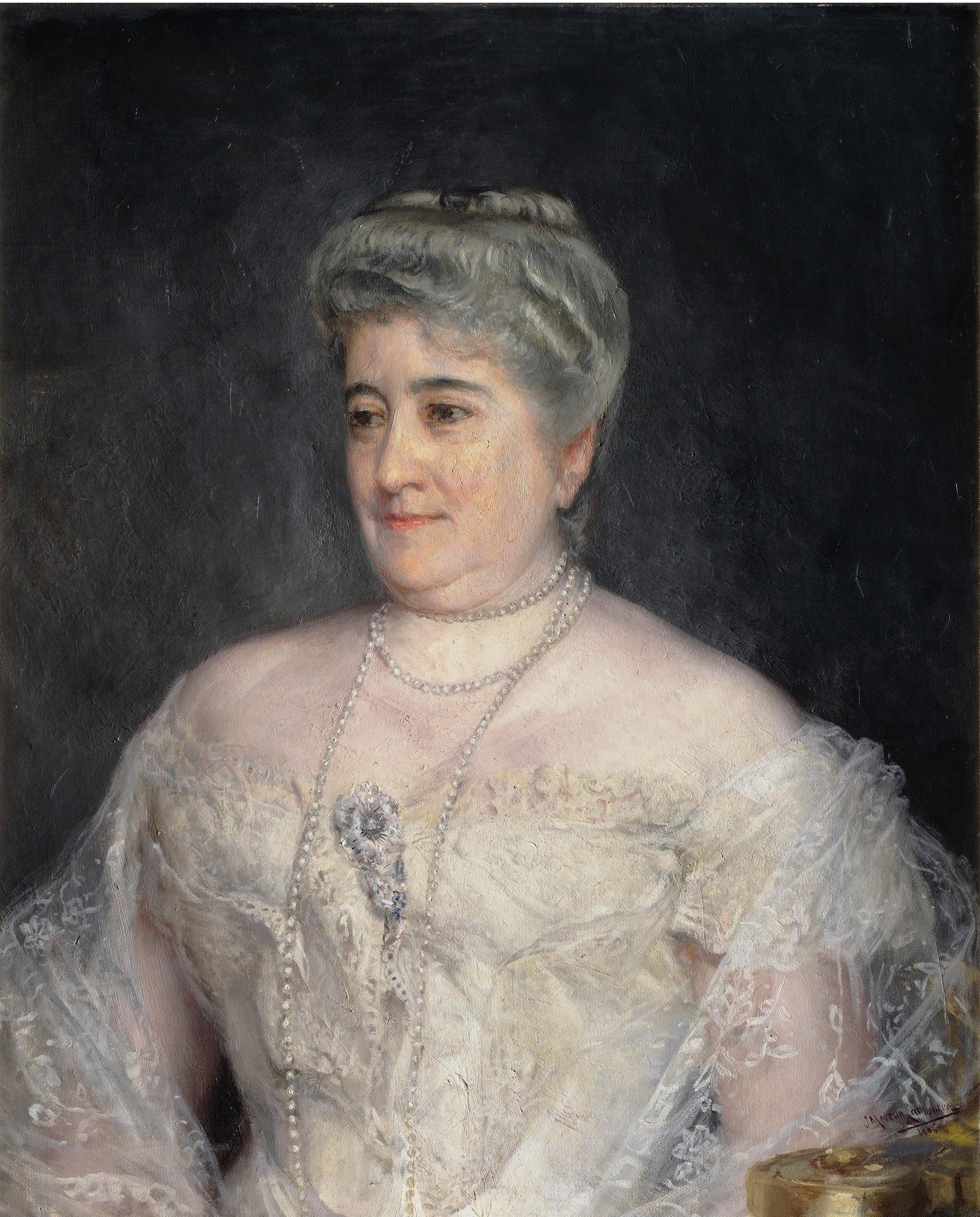 Retrato de Purificación Fontán († 1921), que fue marquesa consorte del Pazo de la Merced por su matrimonio con el político español José Elduayen Gorriti, a quien el rey Alfonso XII concedió dicho título en 1875.